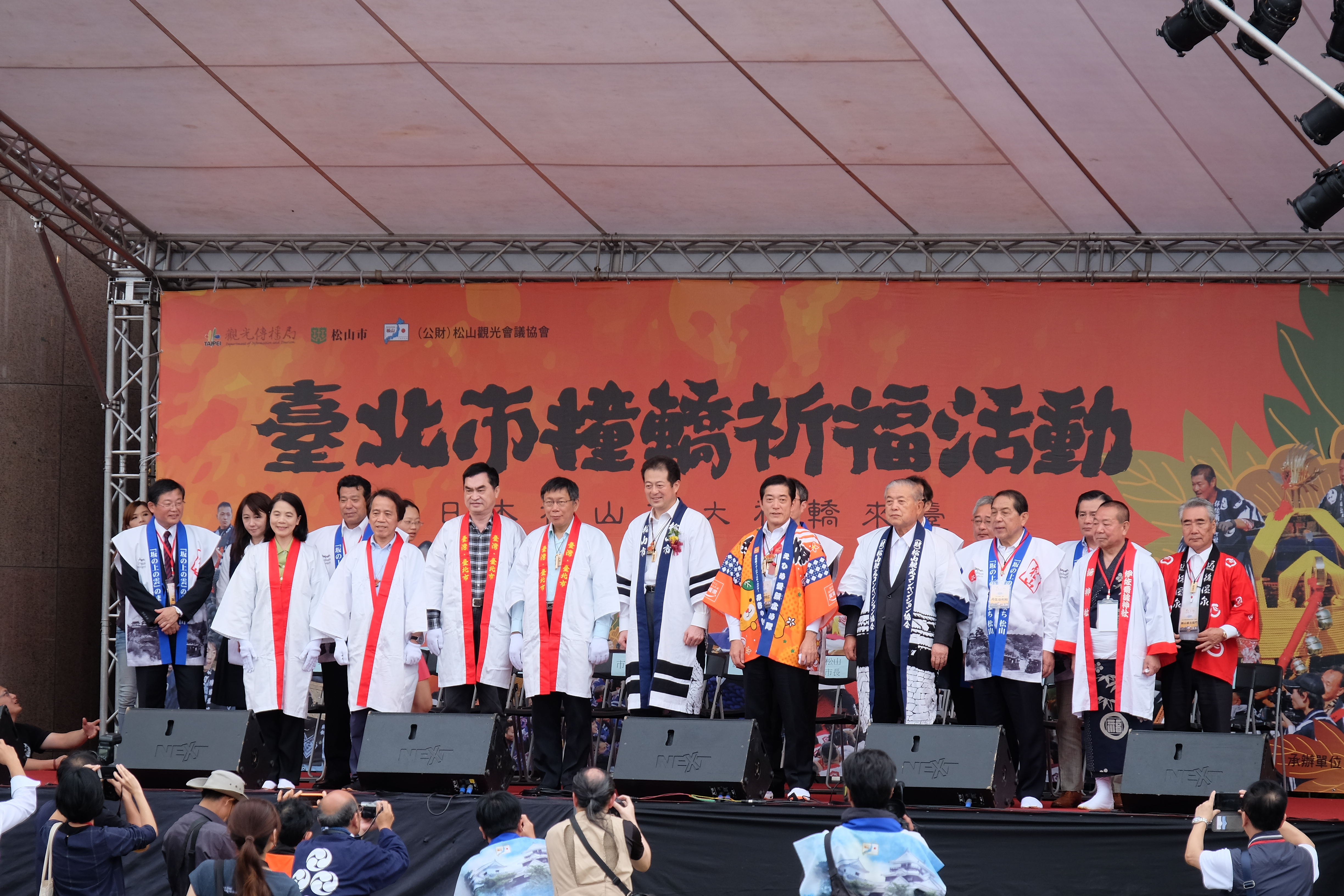 臺北市市民廣場撞轎祈福活動，第二撞（第二発）之後，臺北市市長柯文哲等因公先行退席，臺北市市長、三位副市長與愛媛縣知事中村時廣、松山市市長野志克仁及其他嘉賓起立，接受媒體記者等合影留念。